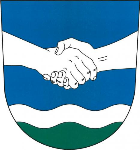 Svépravice znak